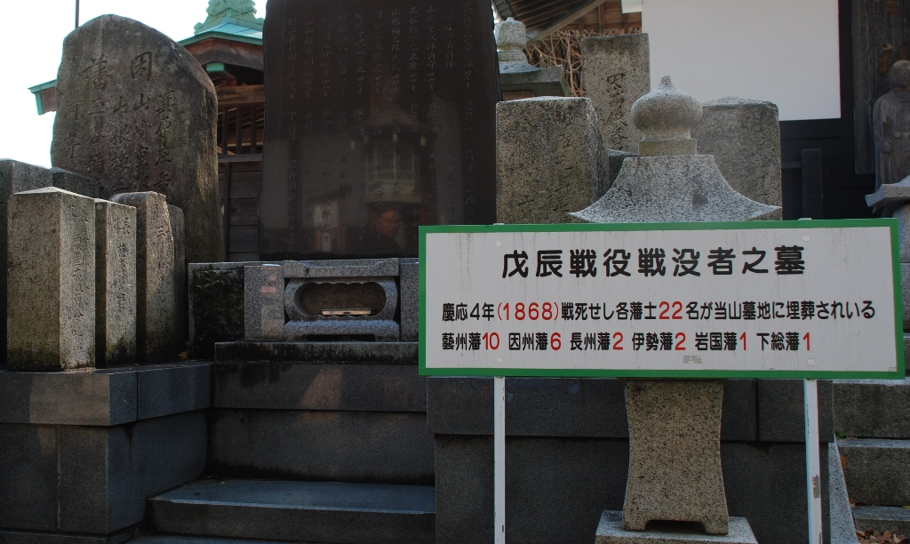 戊辰戦争のとき、新政府軍の奥州出張病院がおかれた。病院長は徳島藩医で外科医の関寛斎である。戦場から重軽症者が運び込まれた。亡くなった戦死者たちが境内に祀られている。広島藩・神機隊の死傷者の数が最も多い。